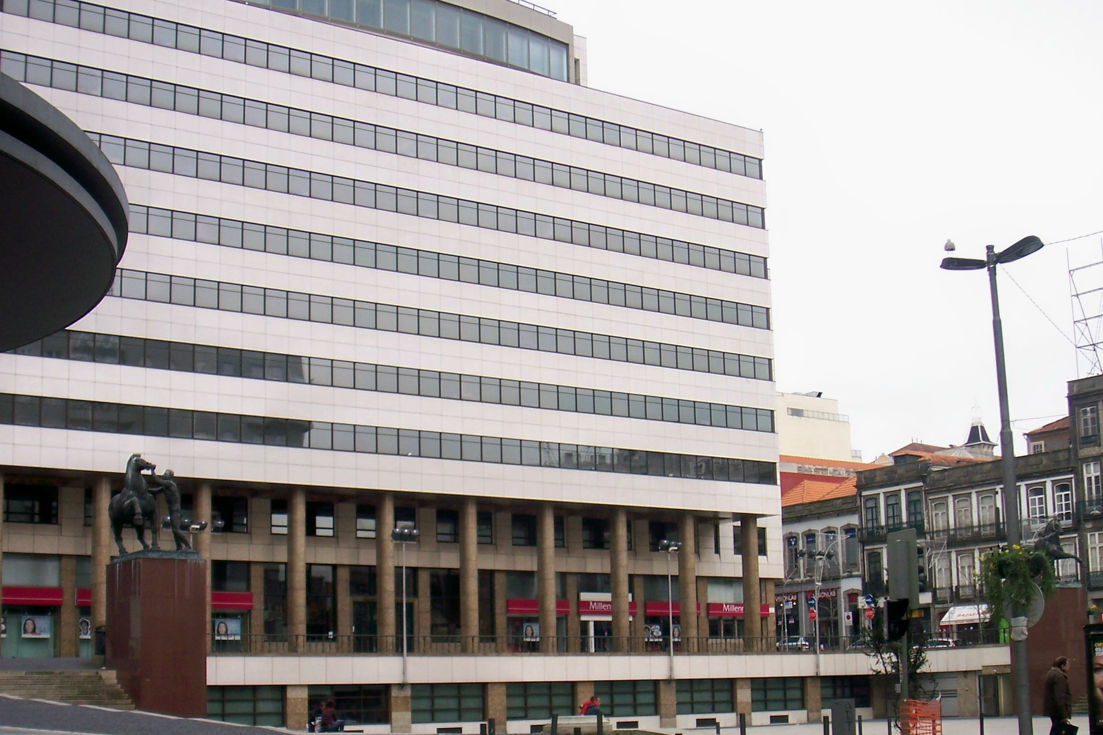 Porto